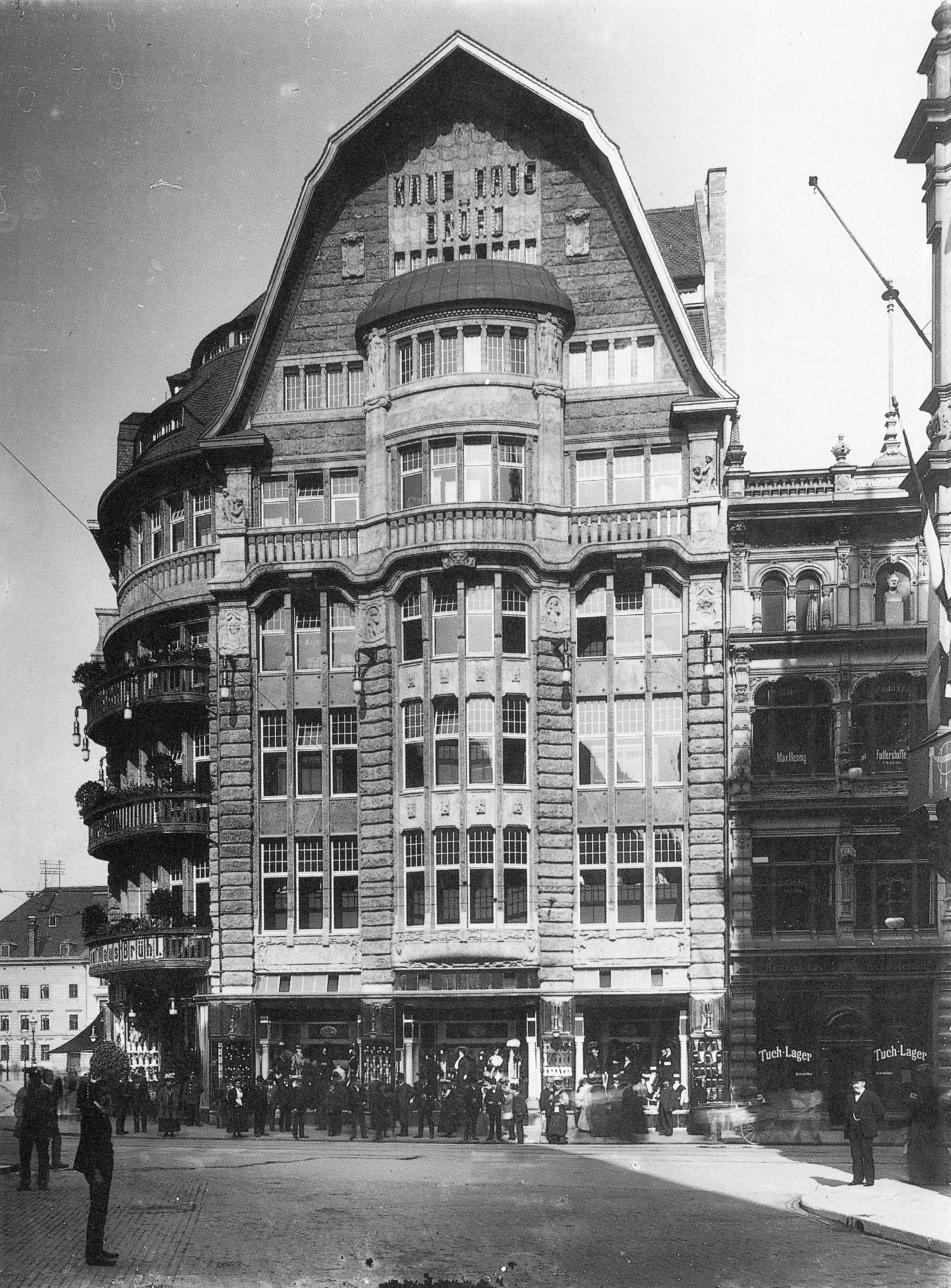 Das Kaufhaus Brühl, Brühl Nr. 1, Leipzig, nach 1908.